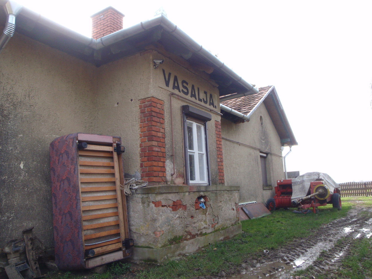 Körmend–Németújvár-vasútvonal, Vasalja állomás épület